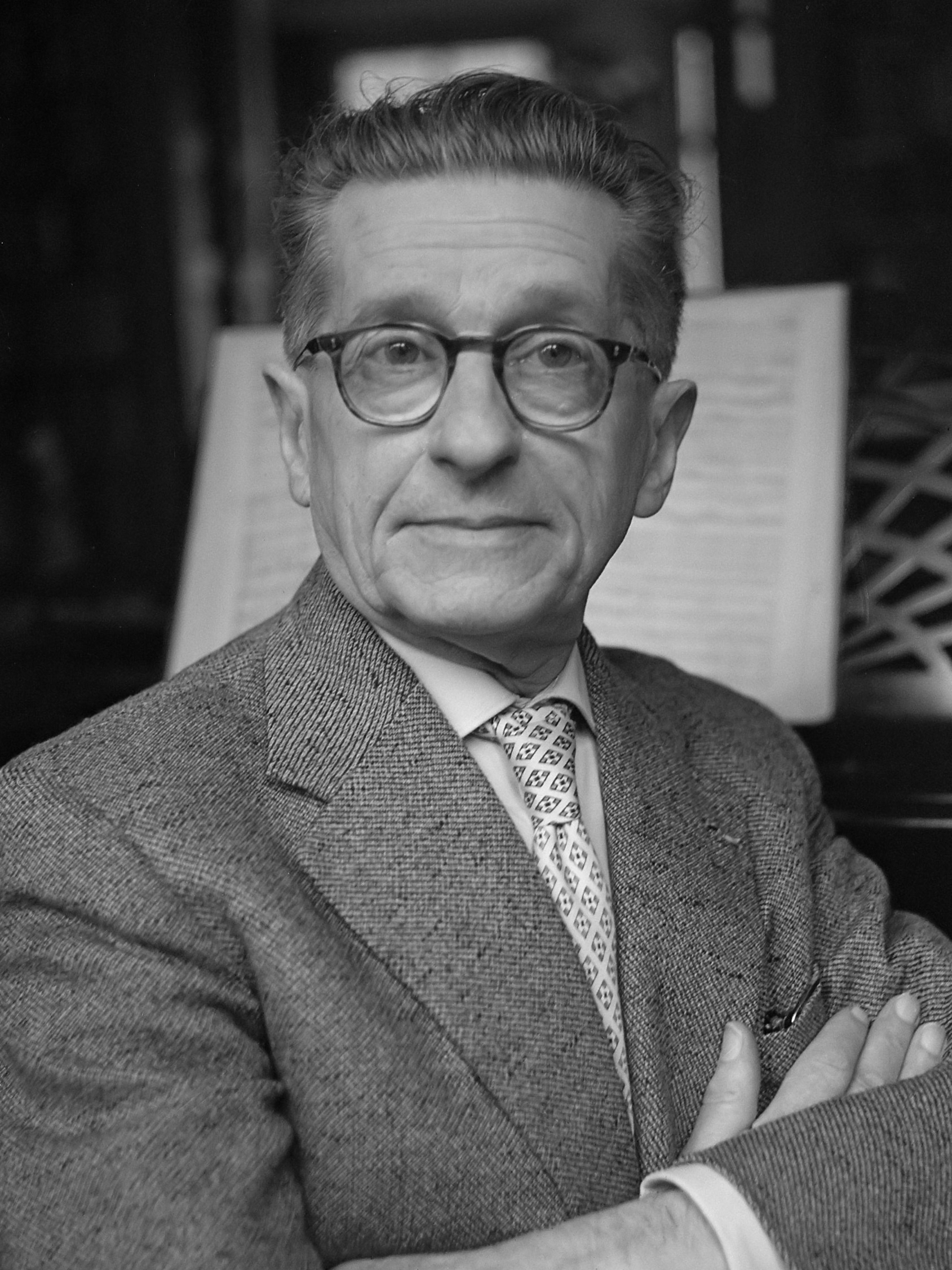 Theo van der Bijl 16 november aanstaande 50 jaar dirigent 12 november 1962